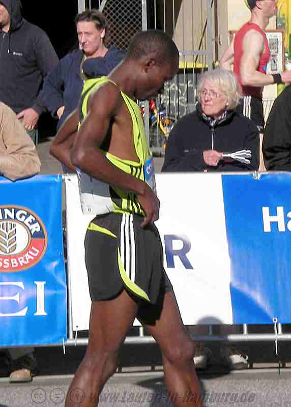 Rogers Rop, Gewinner des Conergy Marathon Hamburg 2007, vor dem Start